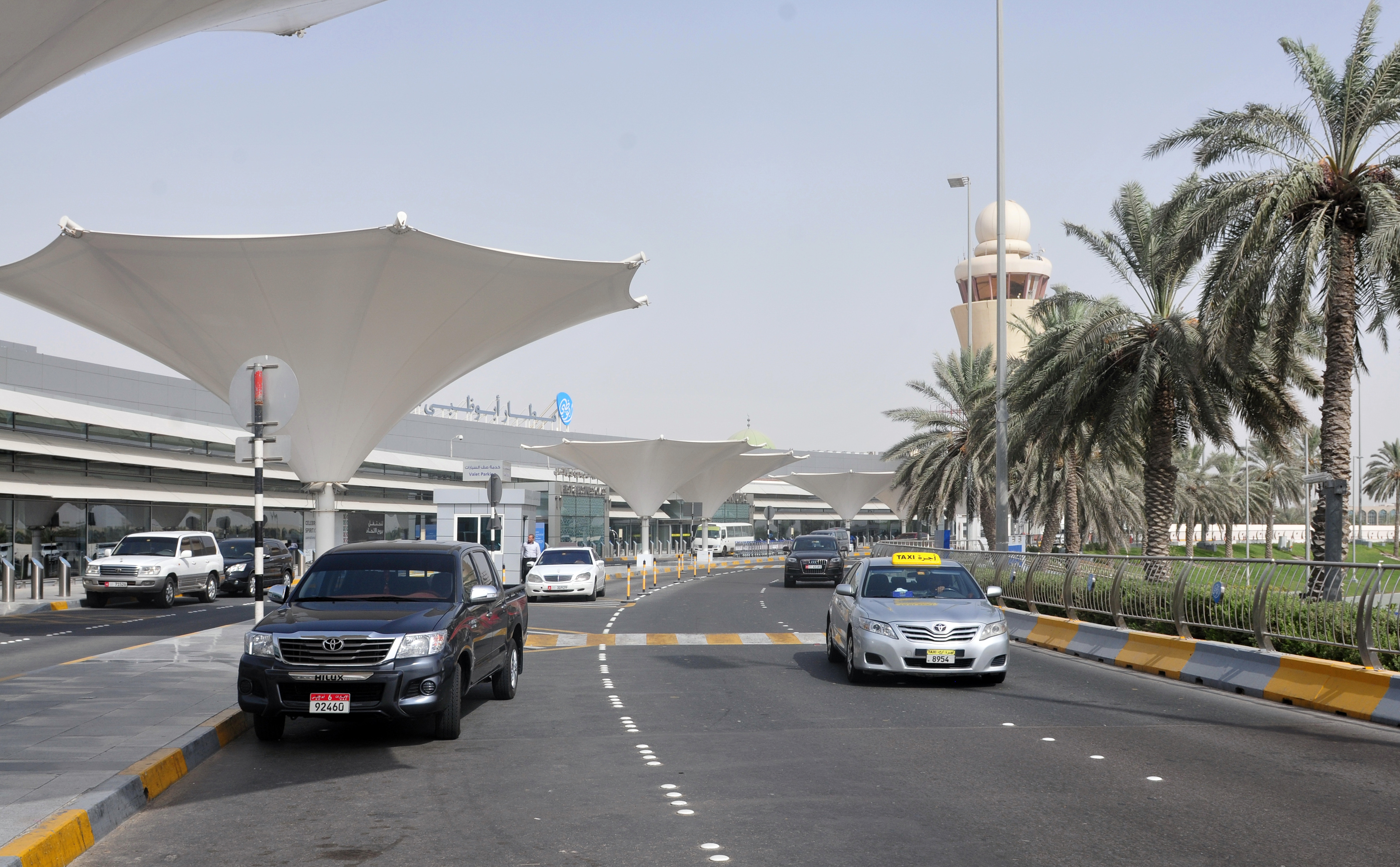 Abu Dhabi Airport, United Arab Emirates